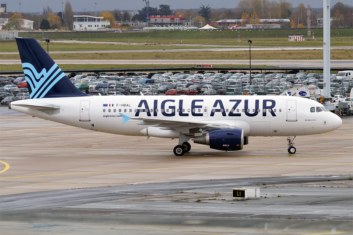 Aigle Azur, F-HBAL, Airbus A320-214